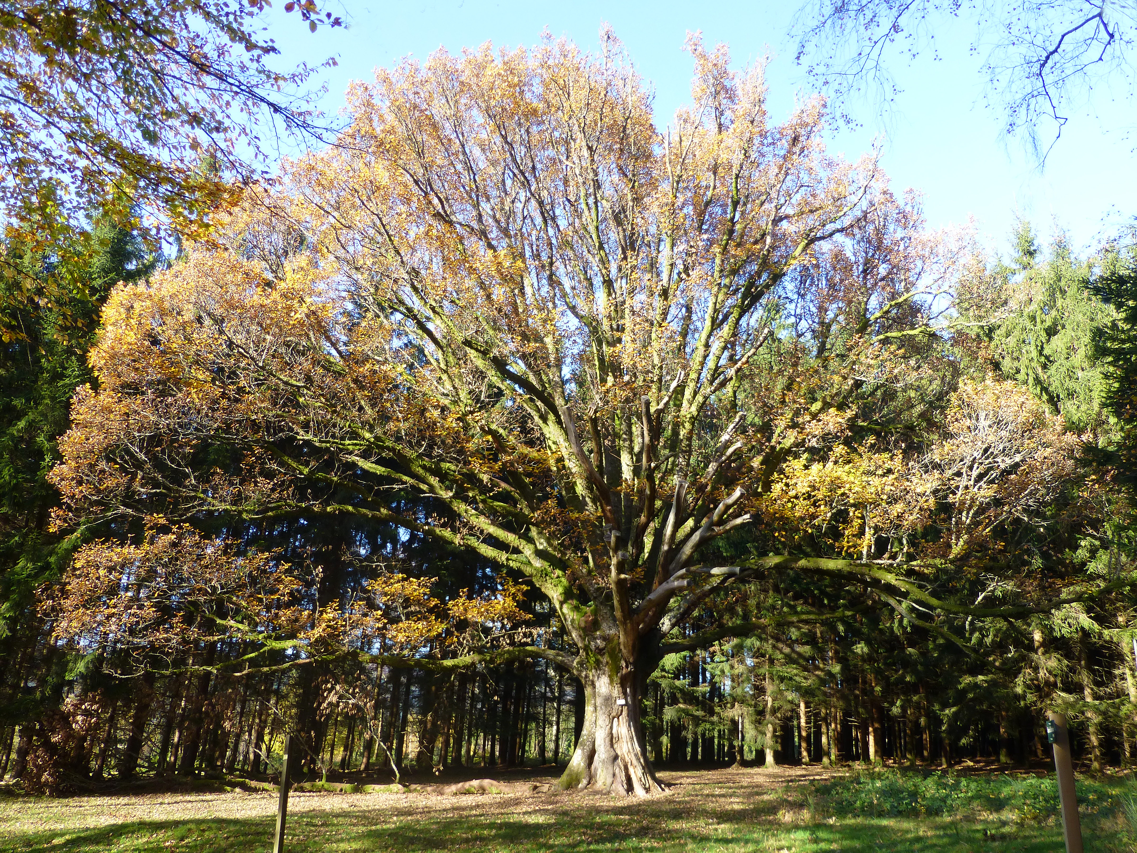 Gros Chêne de Salm en automne (La Broque, Bas-Rhin)